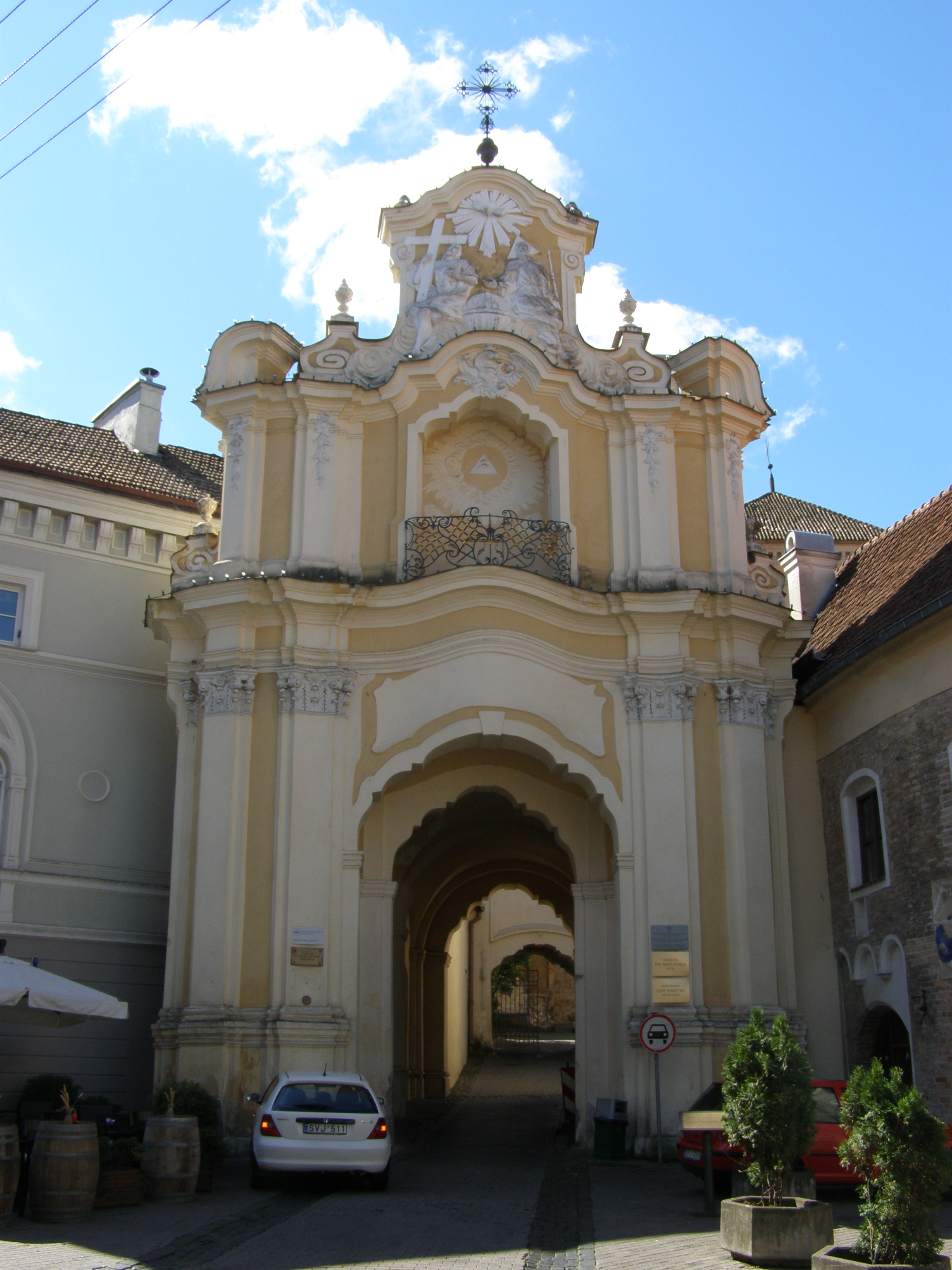 Brama zewnętrzna monastyru Świętej Trójcy w Wilnie (tzw. Wrota bazyliańskie)